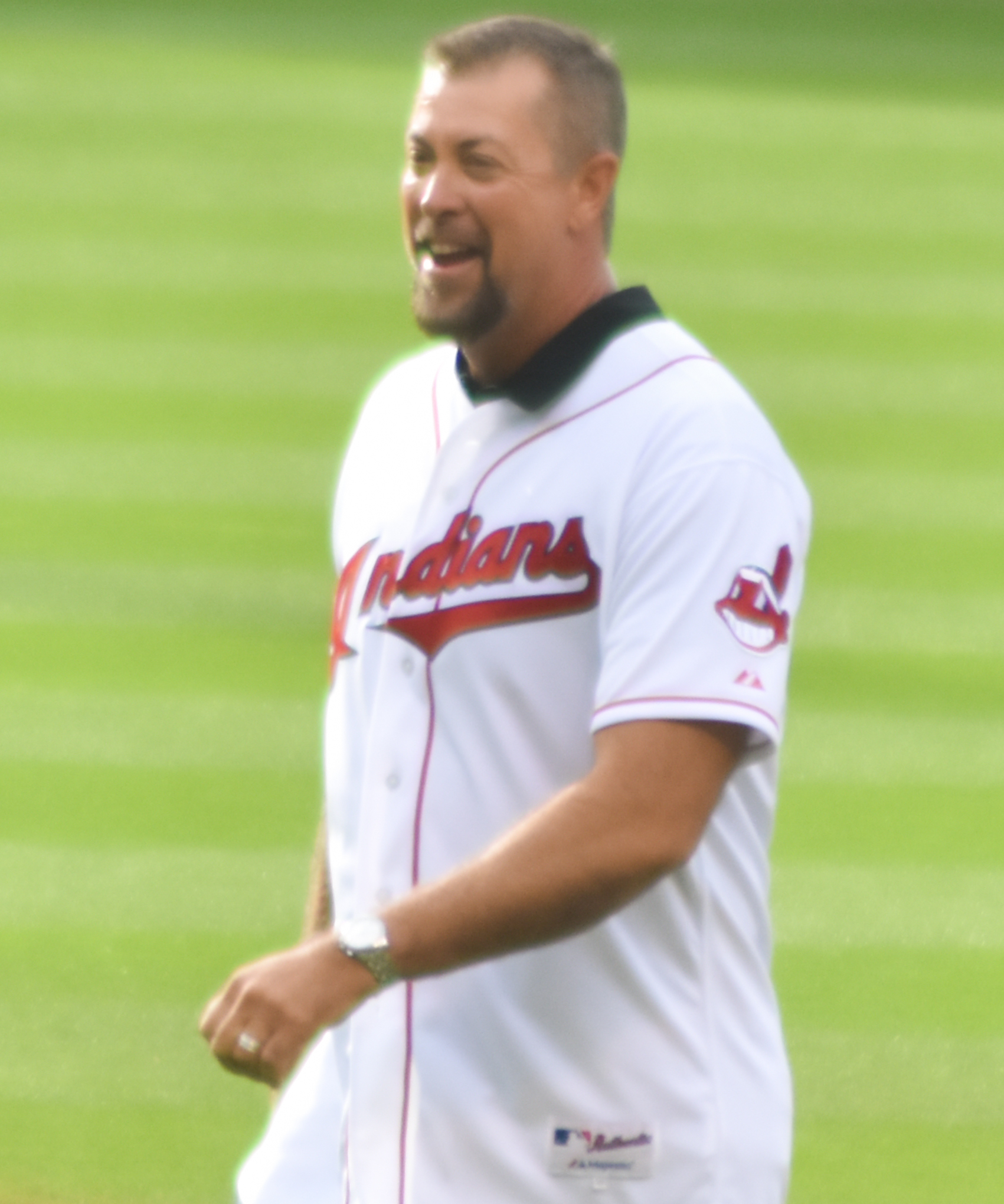 Eric Plunk